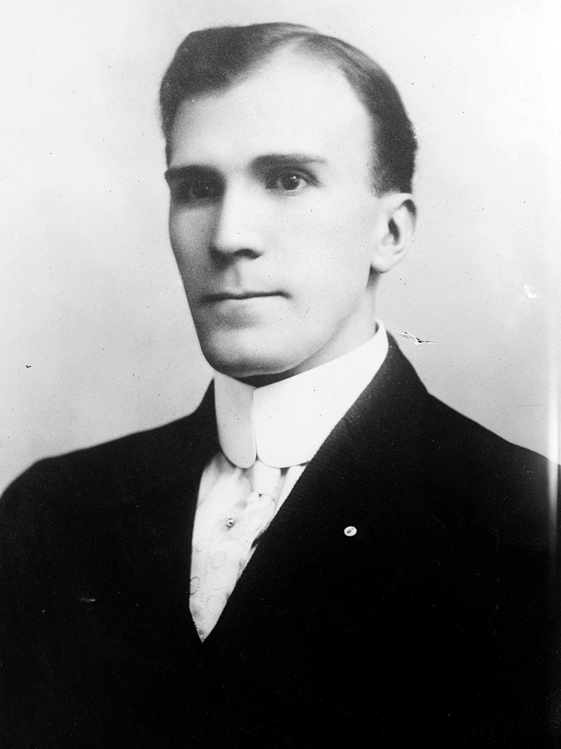 Melville Clyde Kelly, US Representative from Pennsylvania